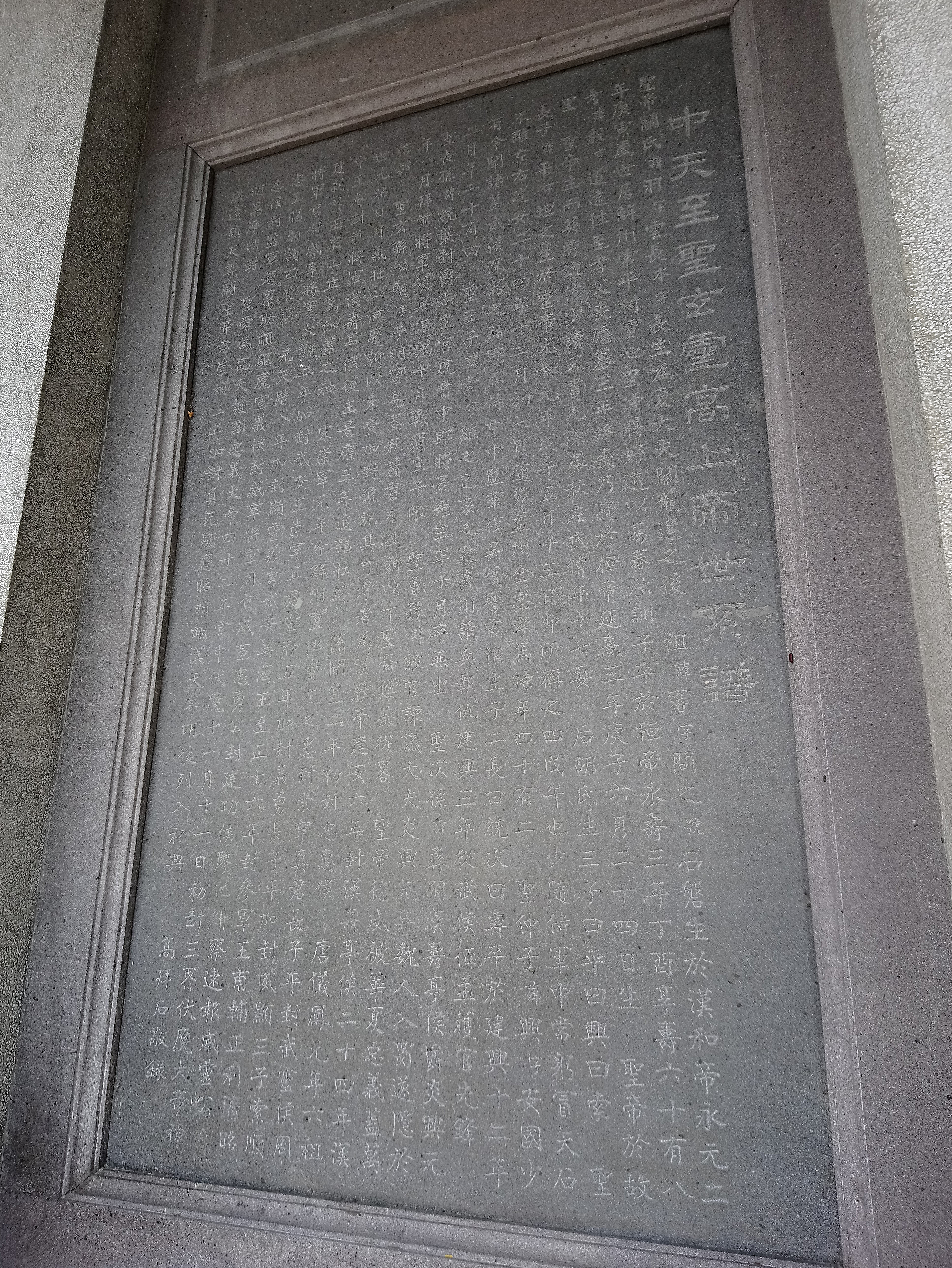 三峽行修宮內高拜石敬錄「中天至聖玄靈高上帝世系譜」,新北市三峽區嘉添里